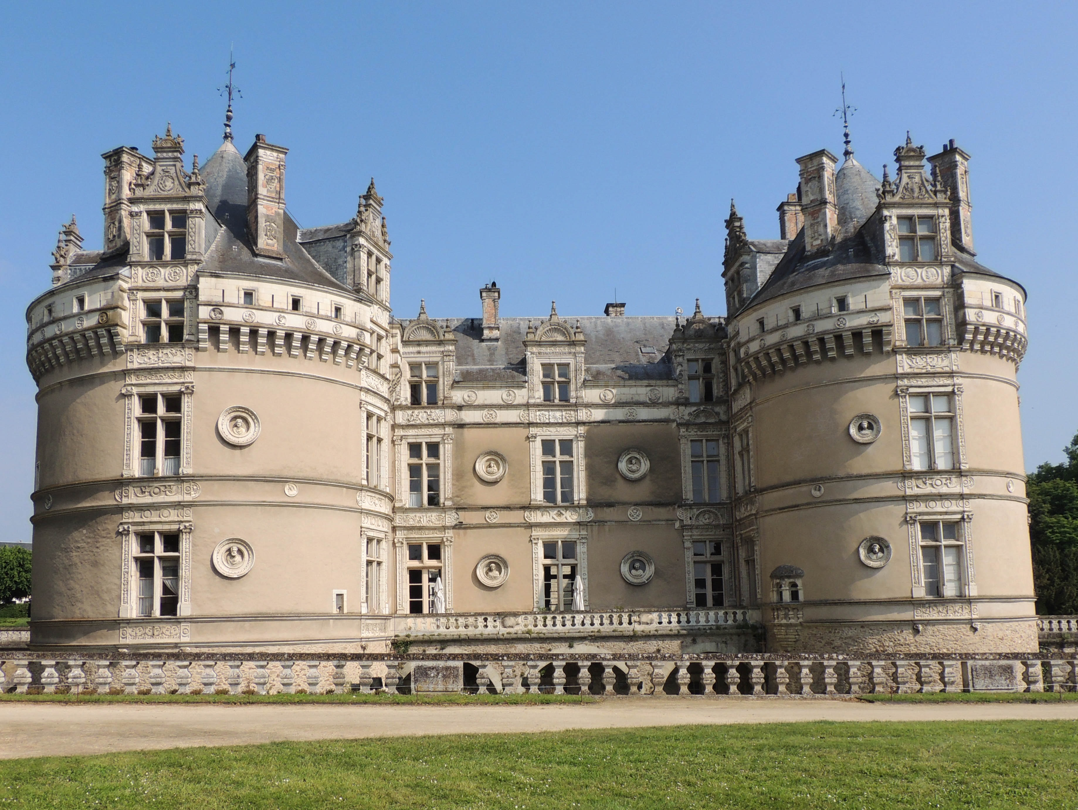 La façade François Ier, de style Renaissance, au château du Lude, en Sarthe.